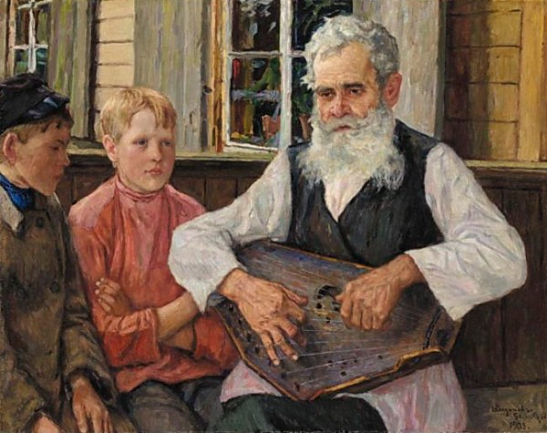 Н. Богданов-Бельский. Гусляр. 1903